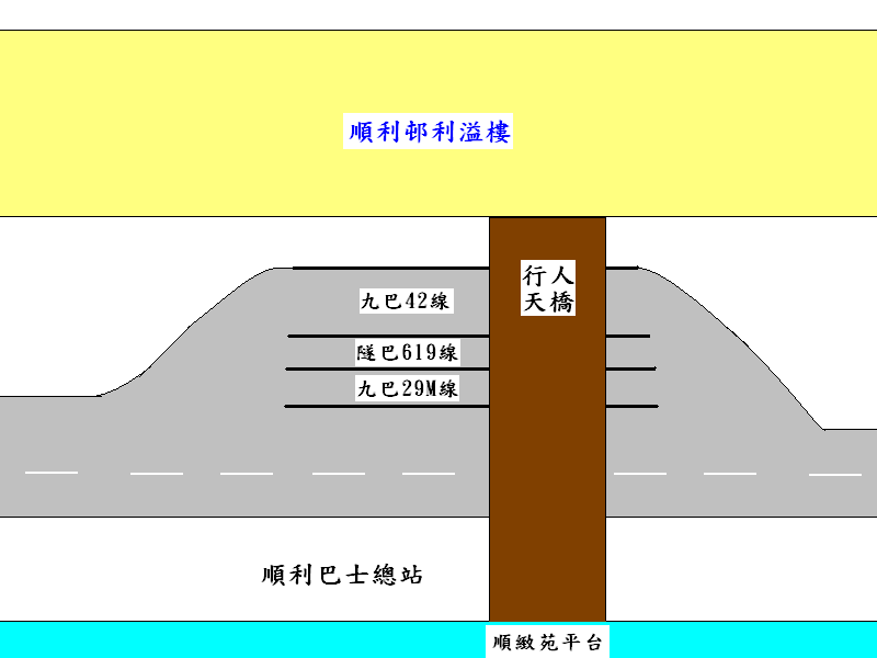 順利巴士總站車站分佈圖